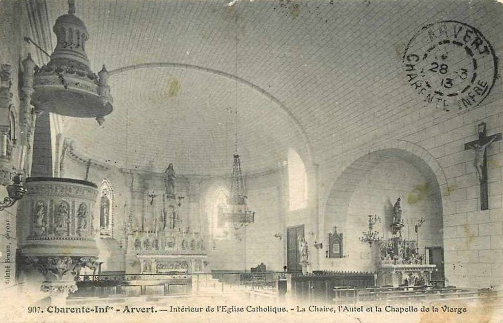 L'interieure de l'église Saint-Étienne d'Arvert